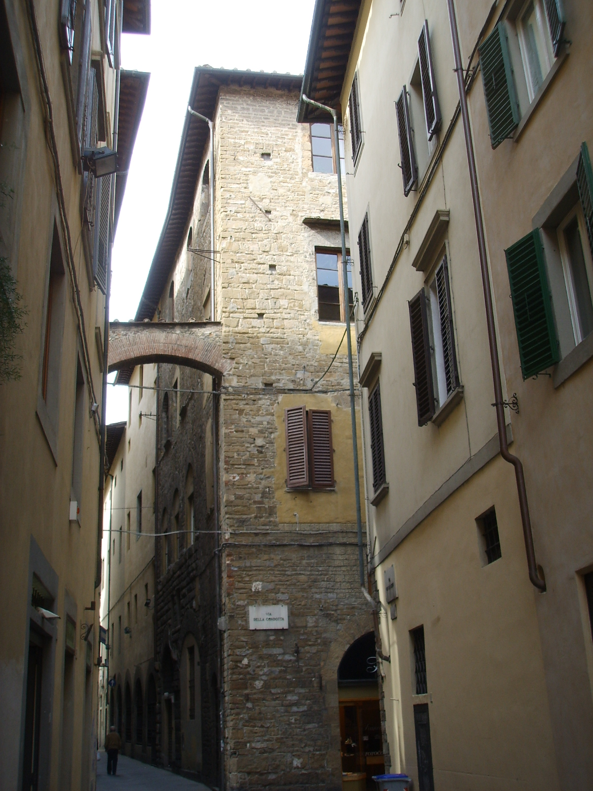 Torre dei sacchetti